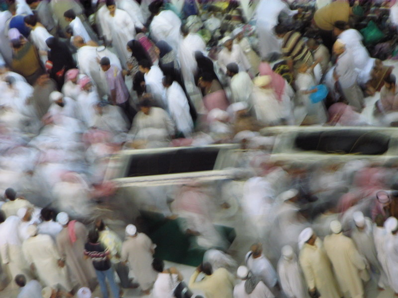 Kabe'de Cenaze namazından hemen sonra ölüler, Erkekler tarafından koşarak mezarlığa götürülür.